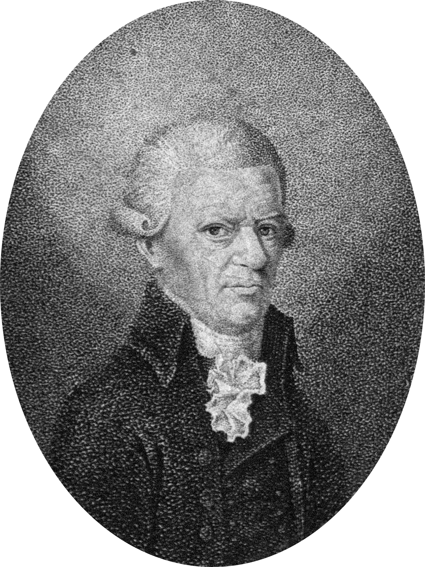 Kupferstich nach einem Gemälde. Motiv: Immanuel Johann Gerhard Scheller (1735–1803)